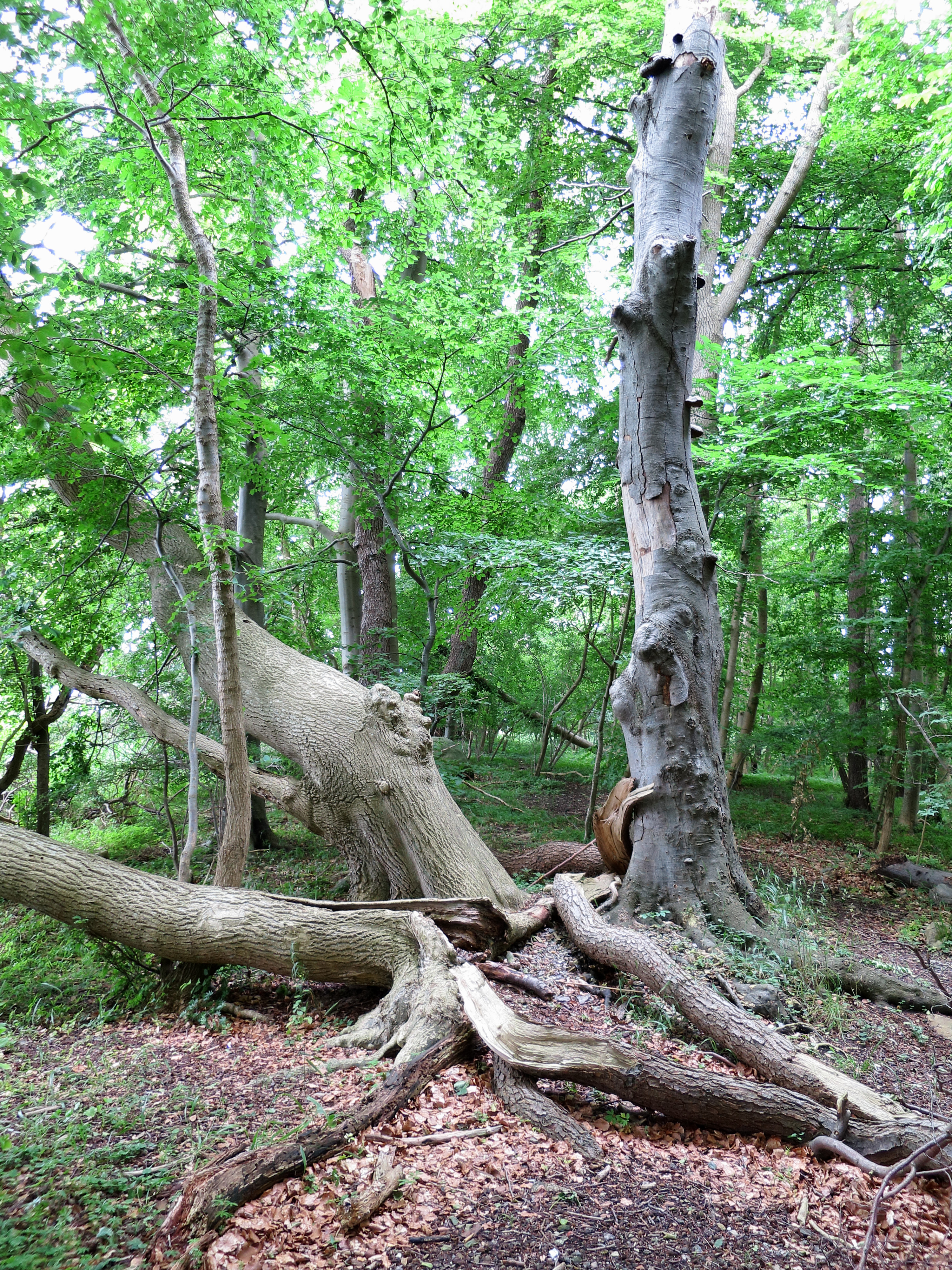 Suserup Skov er en naturskov, hvilket betyder, at den får lov at udvikle sig naturligt. Døde træer bliver for eksempel ikke fjernet.